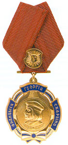 Belarusian state Order